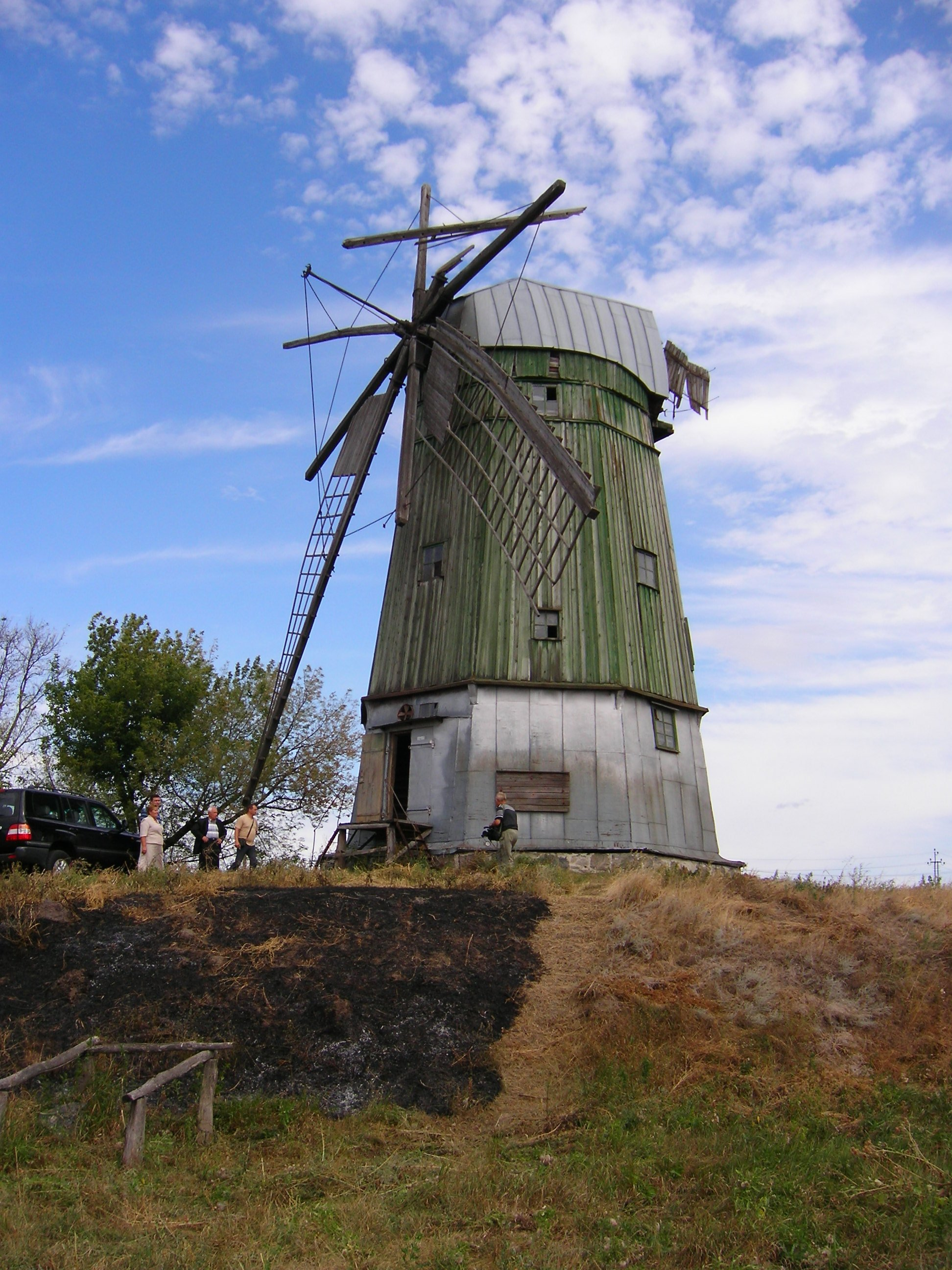 Вітряк 1902 року побудови в с. Пустовійти Миронівського району